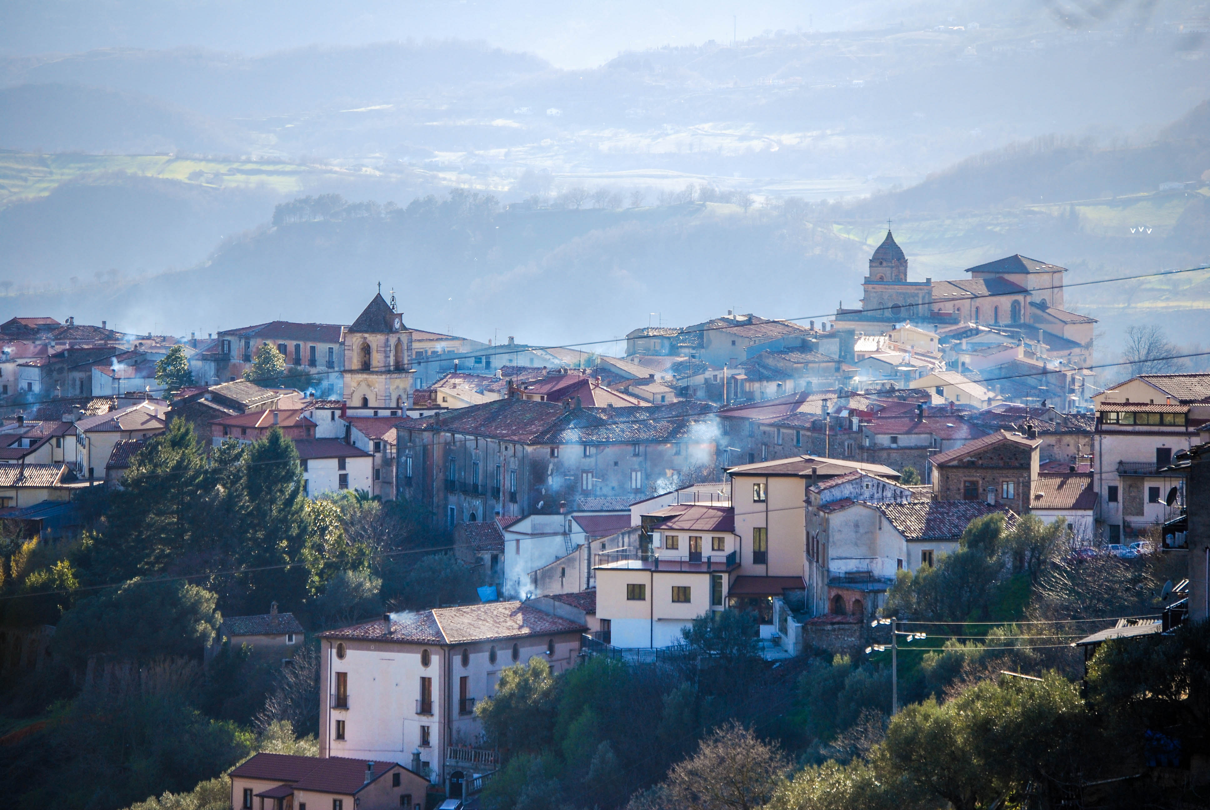 Scatto dalla circonvallazione Lara-Ralli